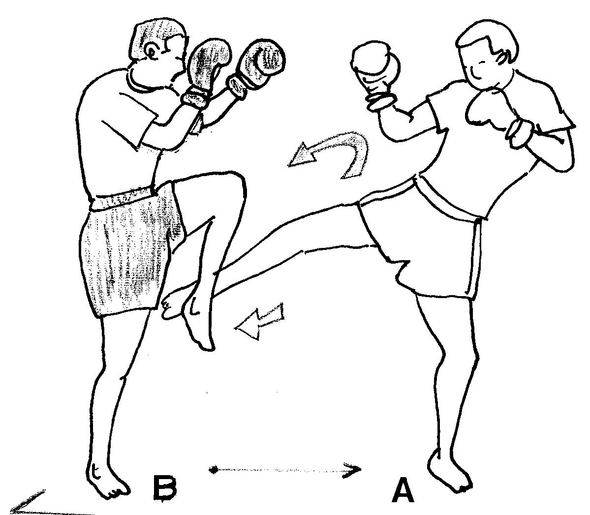 absorb_low2.jpg